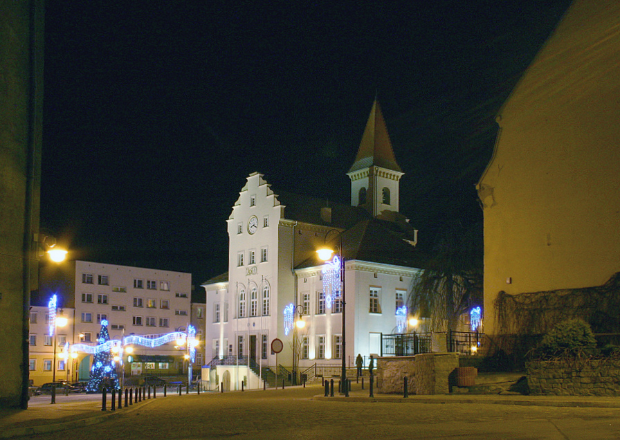 Budynek trzebnickiego ratusza.